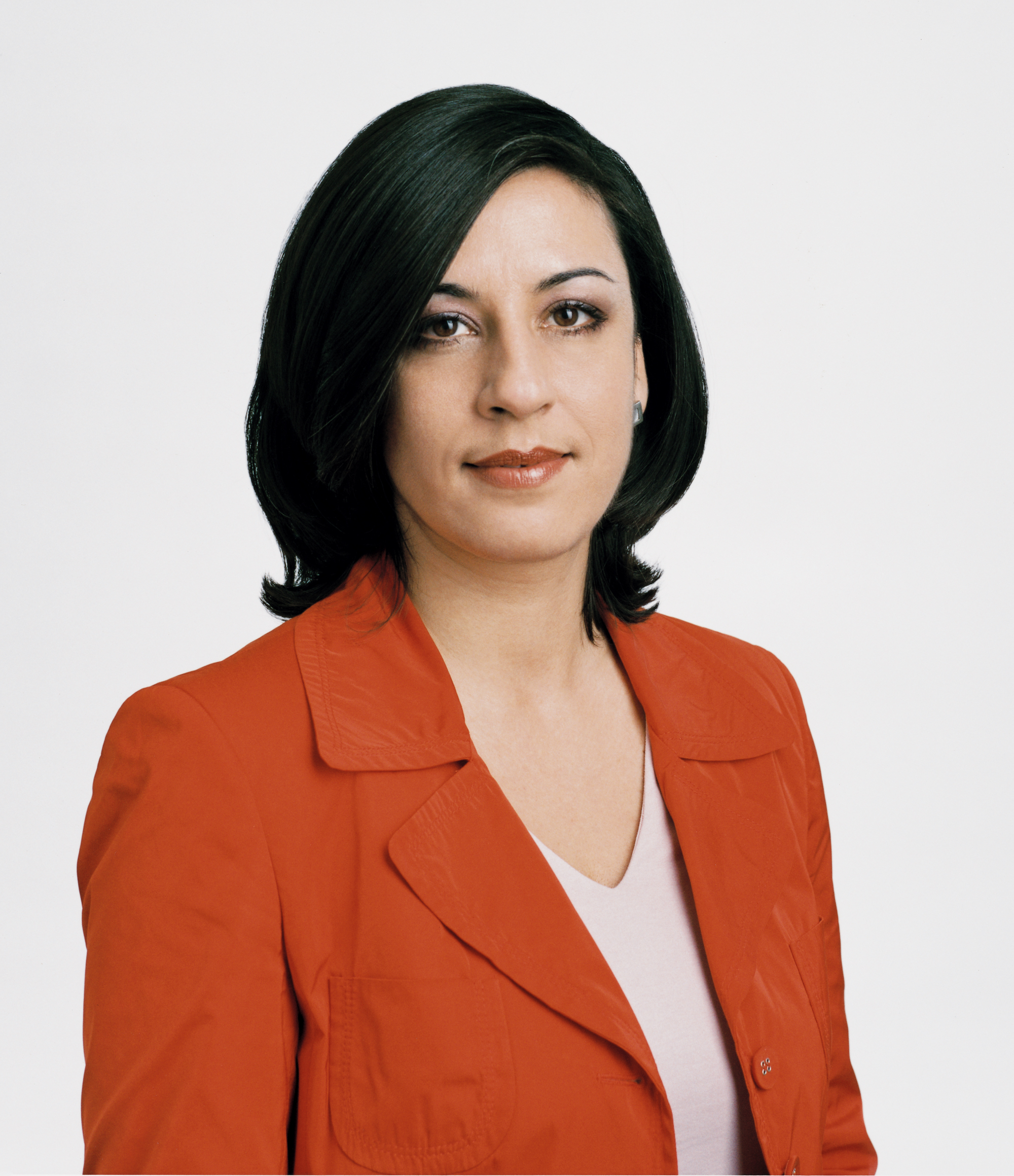 Maria Vassilakou. Wiener Landtagsabgeordnete und Mitglied des Wiener Gemeinderats (Die Grünen)